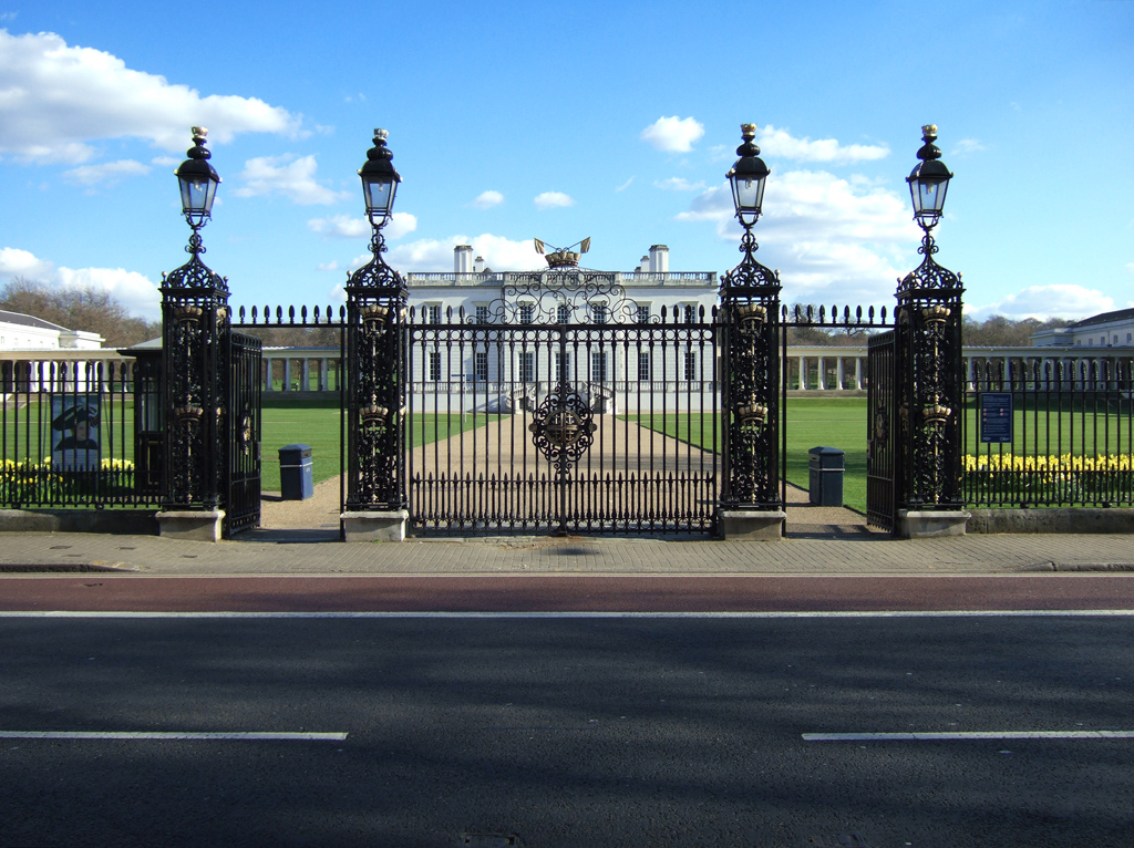 Gates outside Queen's House, Greenwich